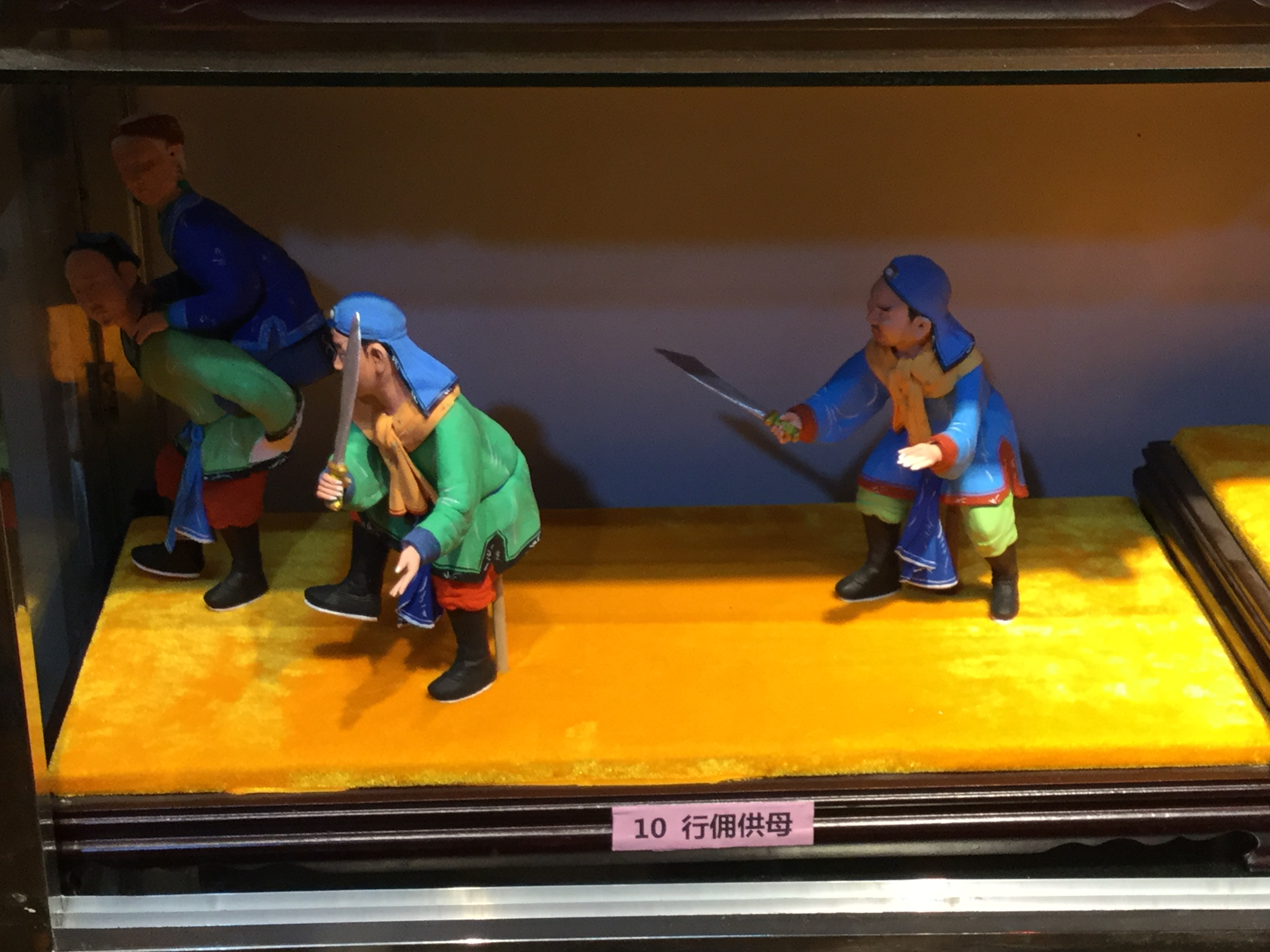 翁仔灯《行佣供母》，摄于2018年3月2日。